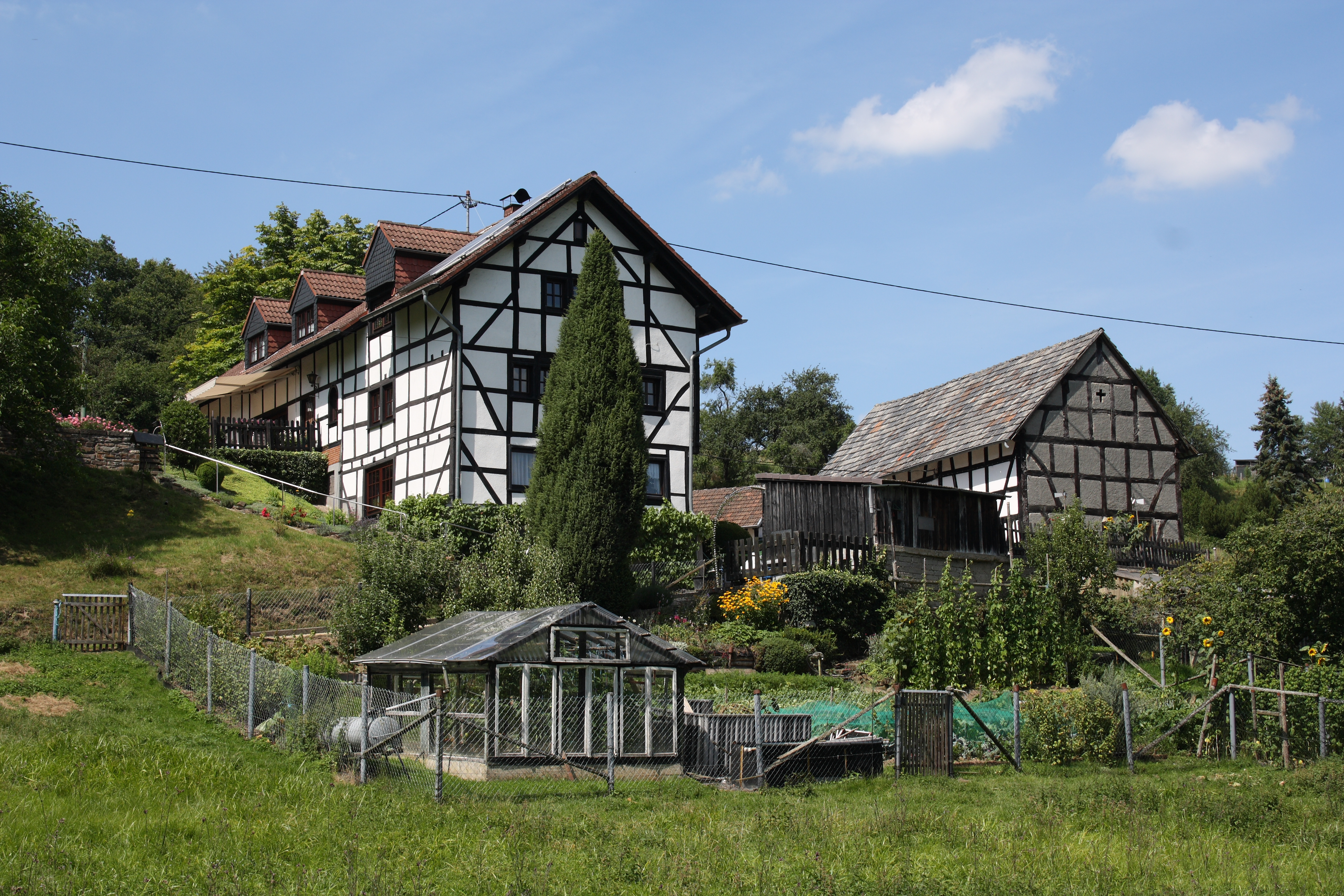 Fachwerkhäuser in Frohnhofen, Ortsteil von Eichenbach